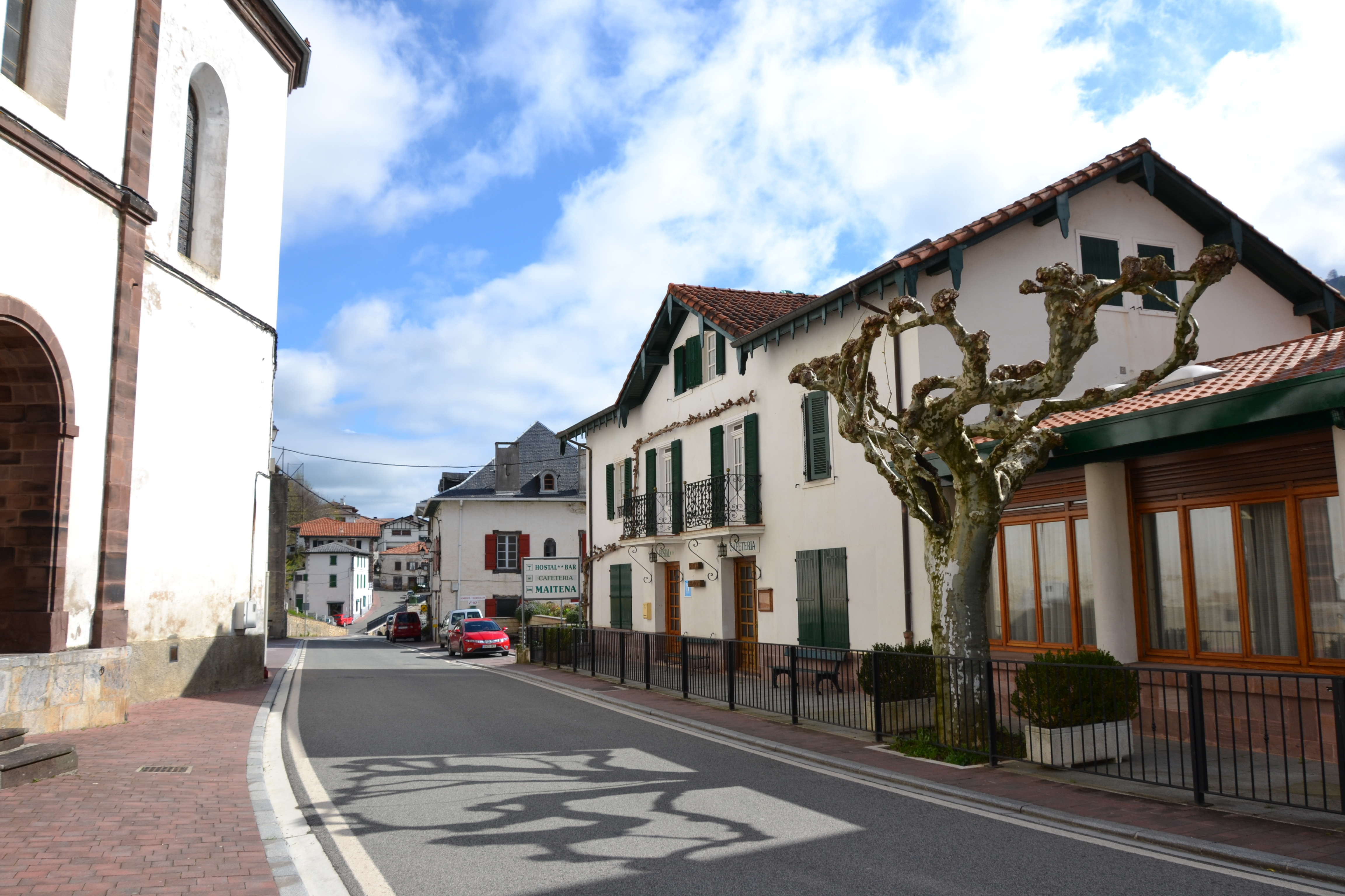 rue à Valcarlos